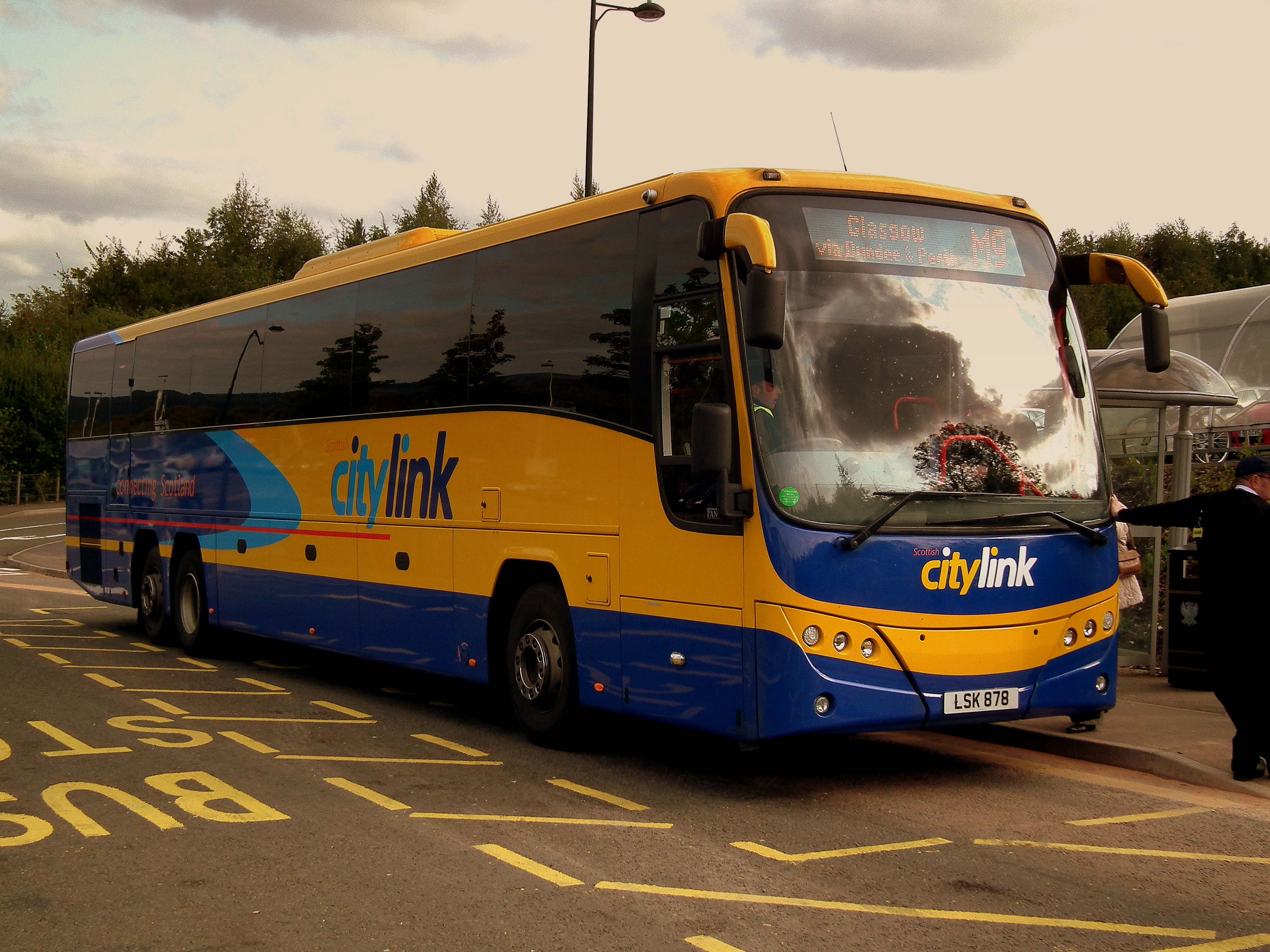 M9 CITYLINK AT PERTH PARK AND RIDE BOUND FOR GLASGOW BUS STATION SEP 2011